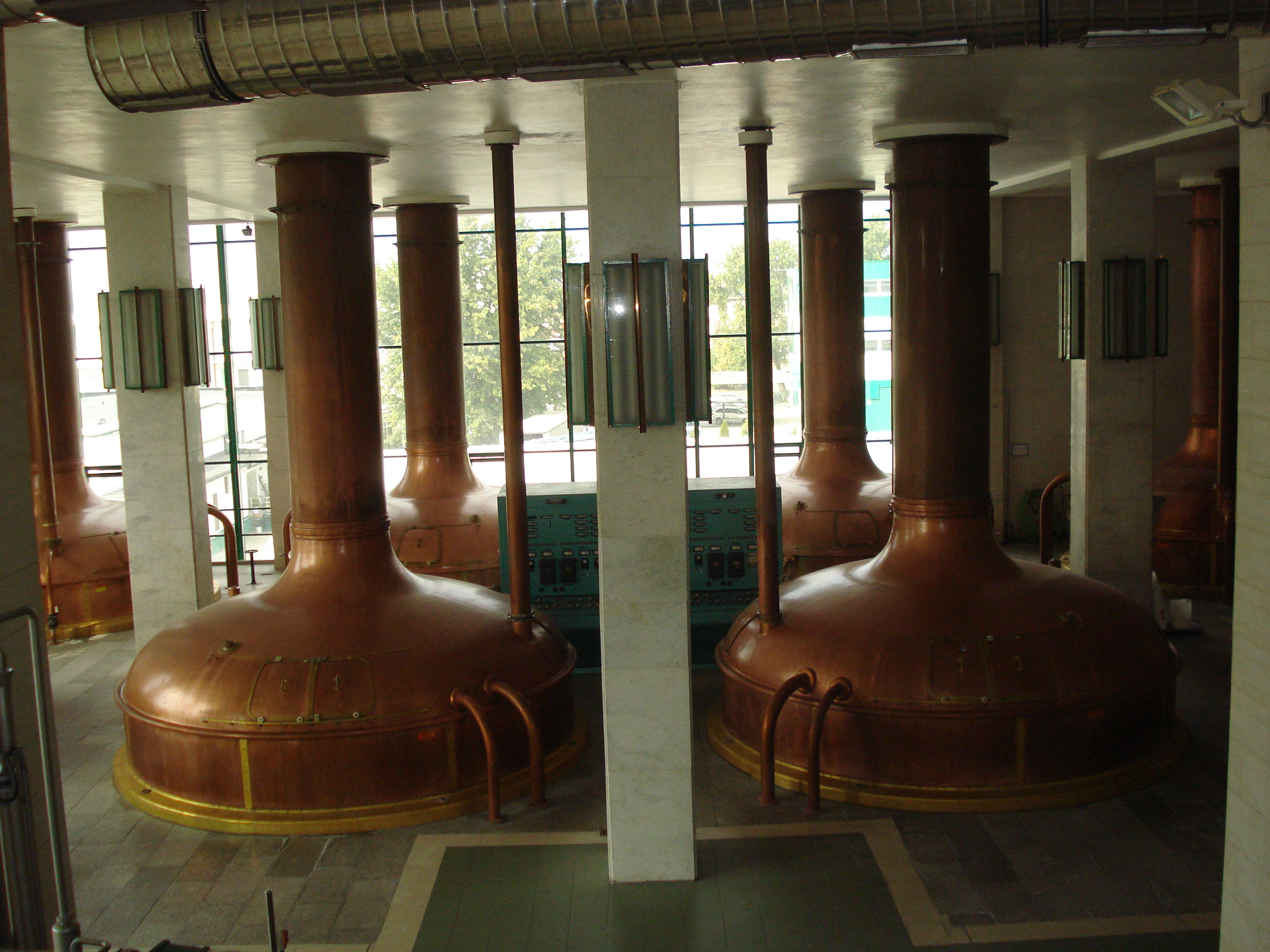 Staré varné kotle, v ktorých sa v minulosti varilo pivo.